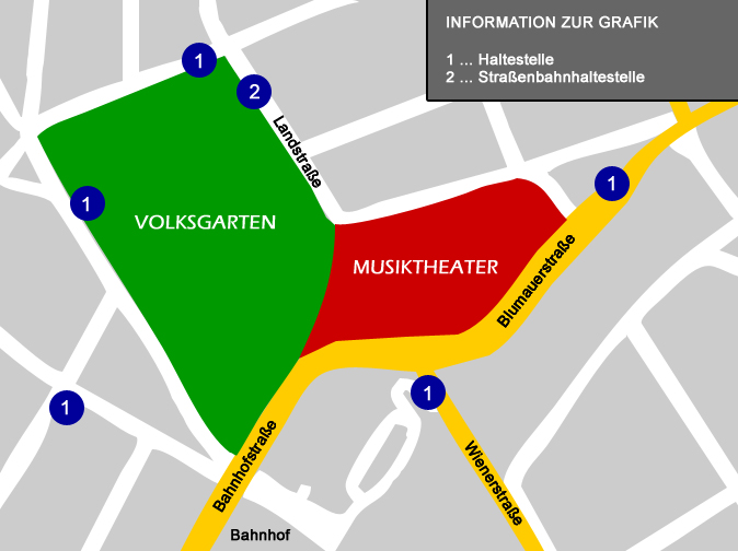 Lage des neuen Musiktheaters in Linz